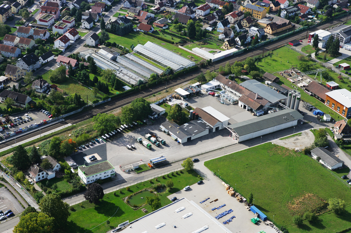 Aktuelles Bild vom STM Firmengelände 2015